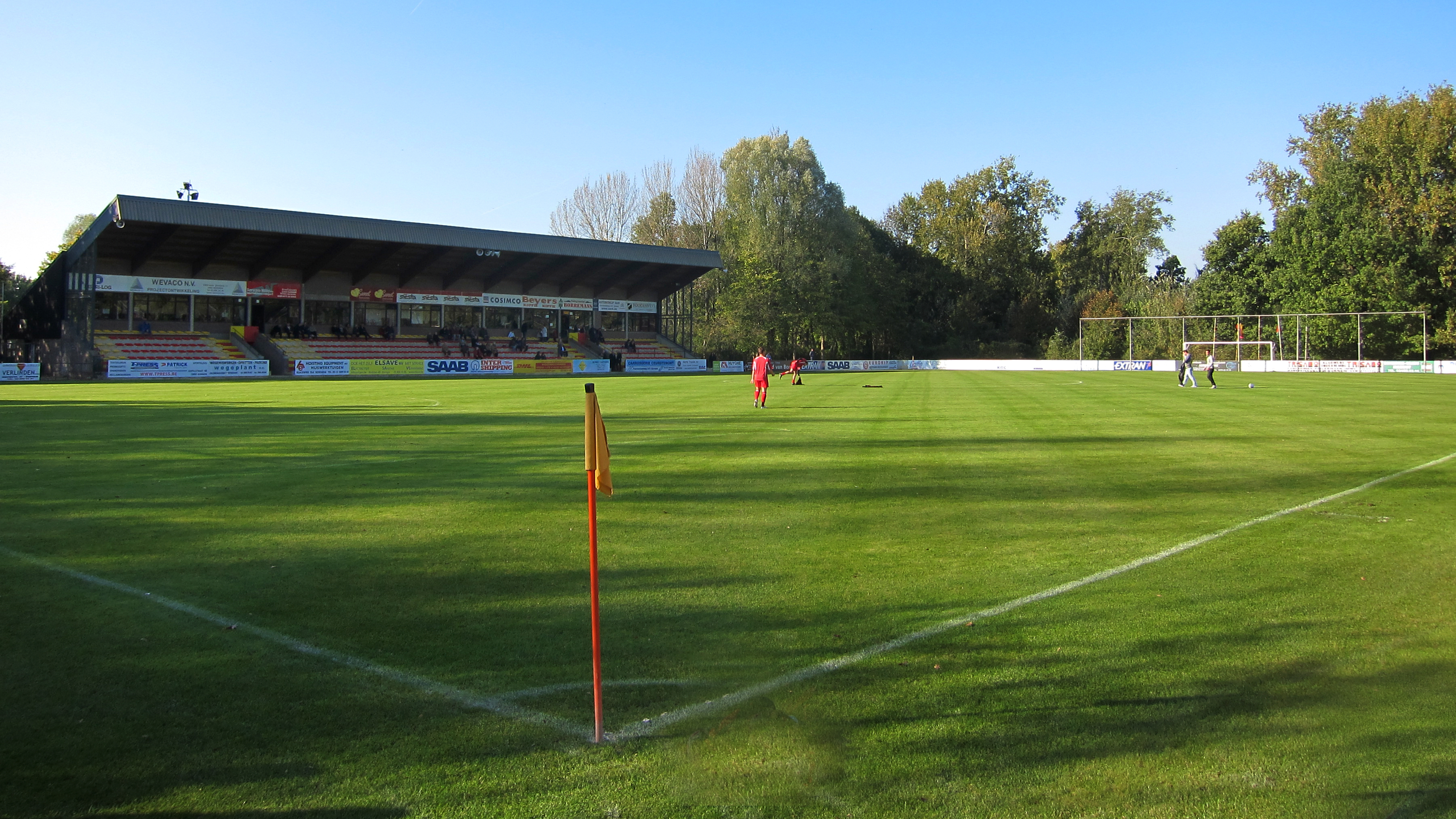 Het voetbalterrein van KSV Bornem, België